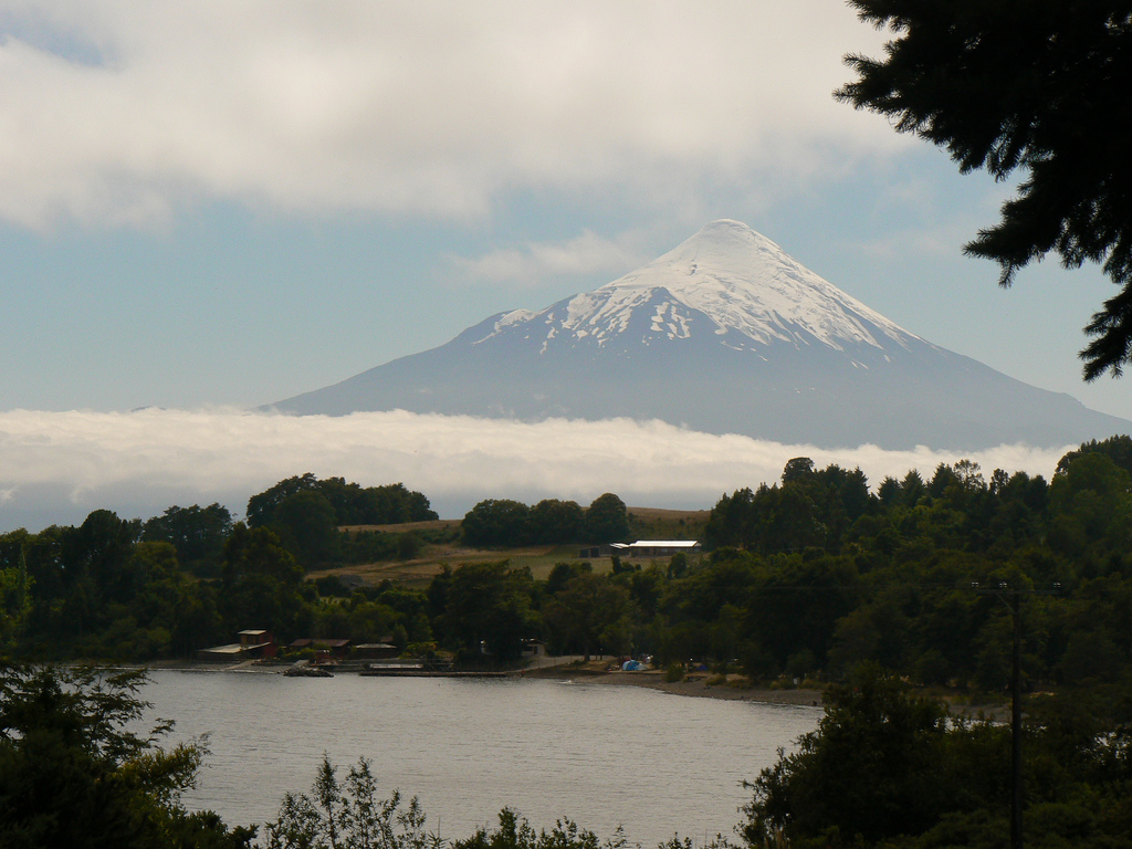 Río Pescado, X Región, Chile